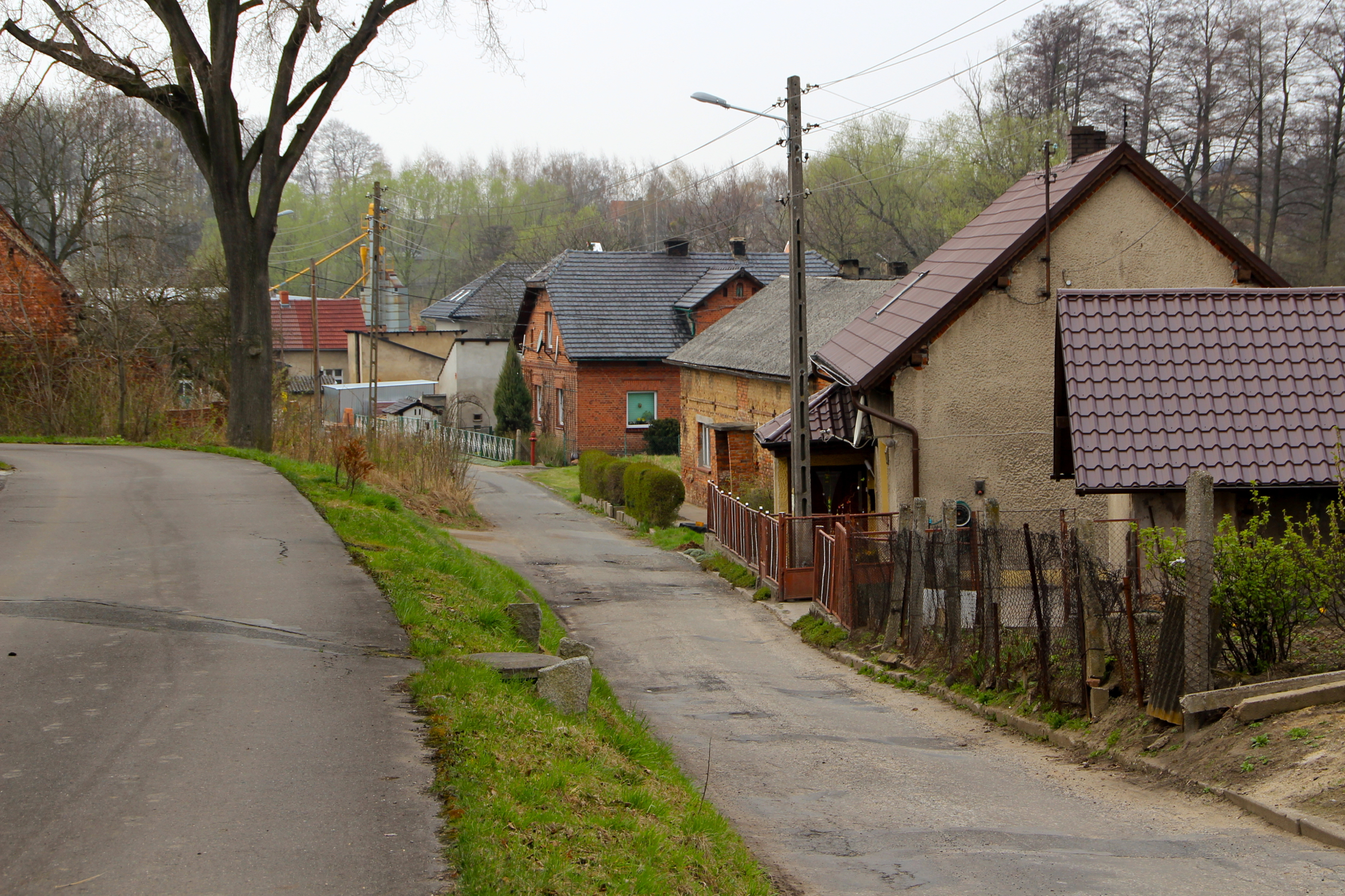 Długomiłowice (dodatkowa nazwa w j. niem. Langlieben) – wieś w Polsce położona w województwie opolskim, w powiecie kędzierzyńsko-kozielskim, w gminie Reńska Wieś.